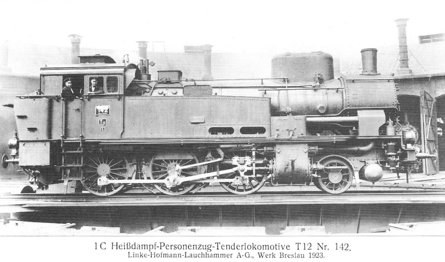 Damplokomotive der Bauart T 12 der Lübeck-Büchener Eisenbahn, Nr. 142 (1938 74 1321, 1958 verschrottet)